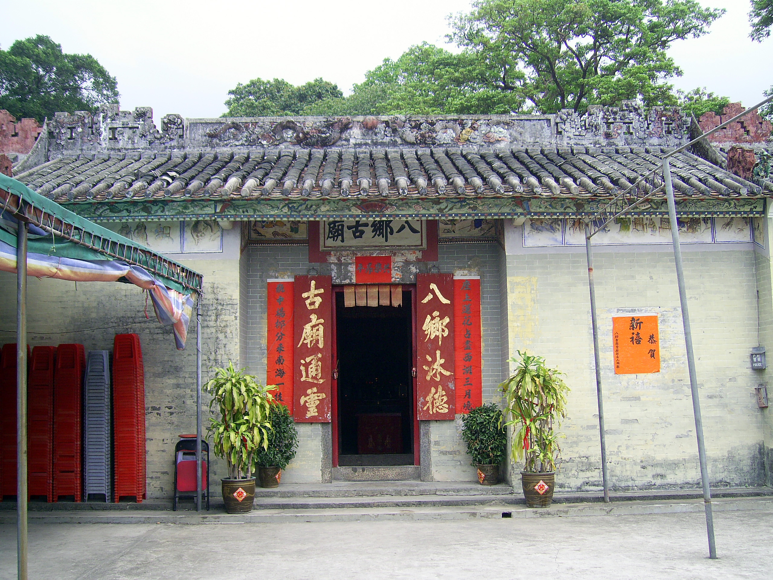 中文（香港）: 八鄉古廟